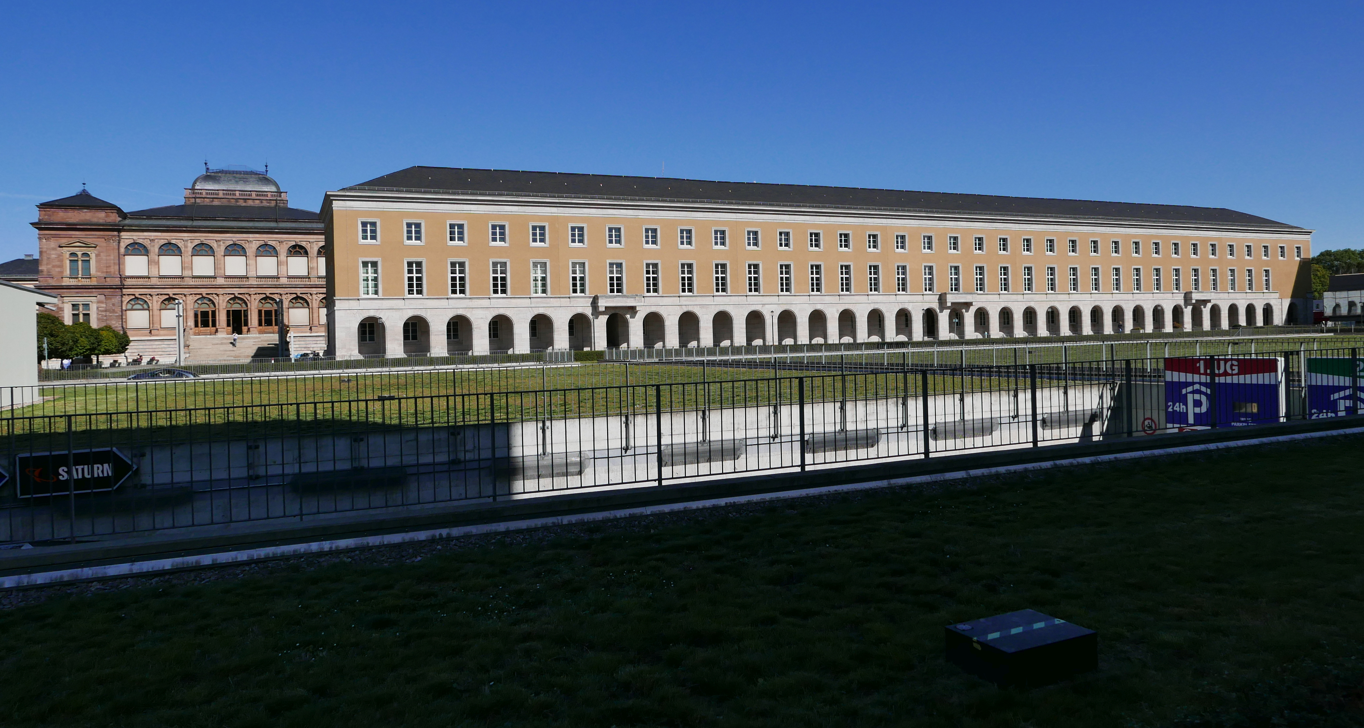 Gauforum Weimar und Neues Museum Weimar (links)